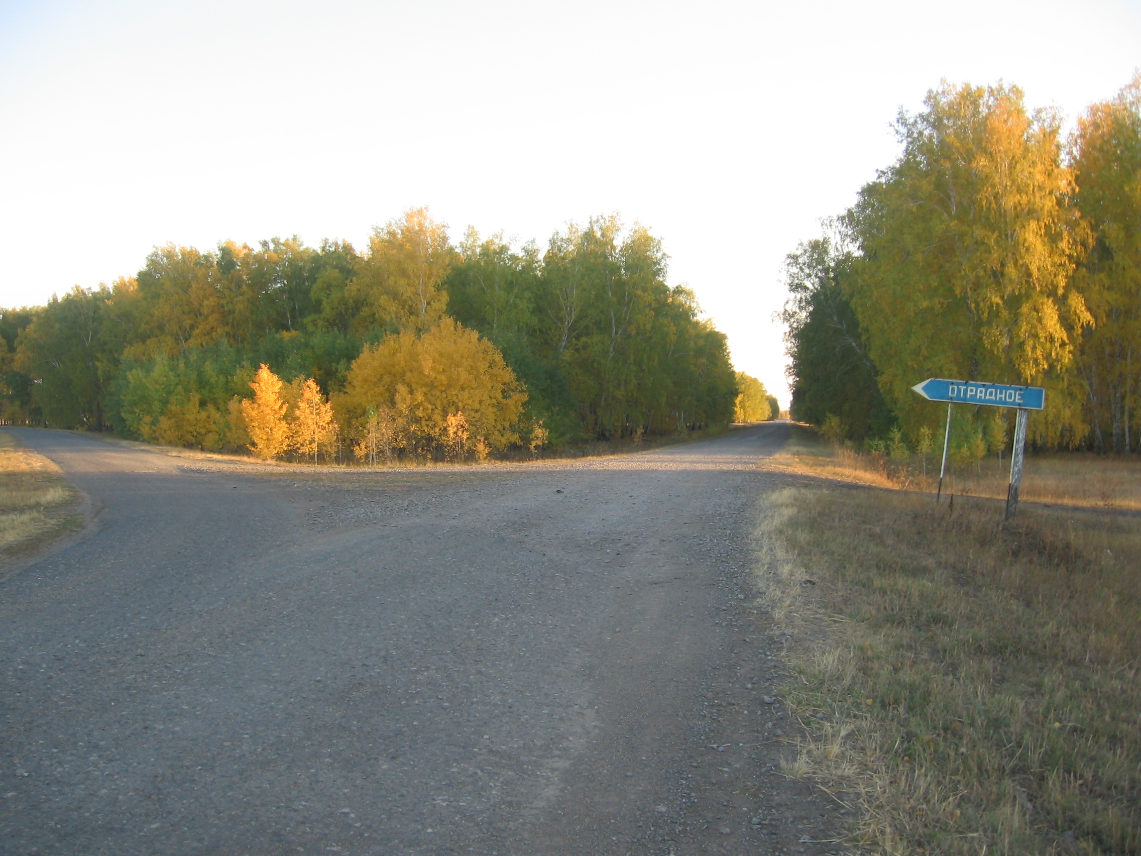 Знак при въезде в Отрадное